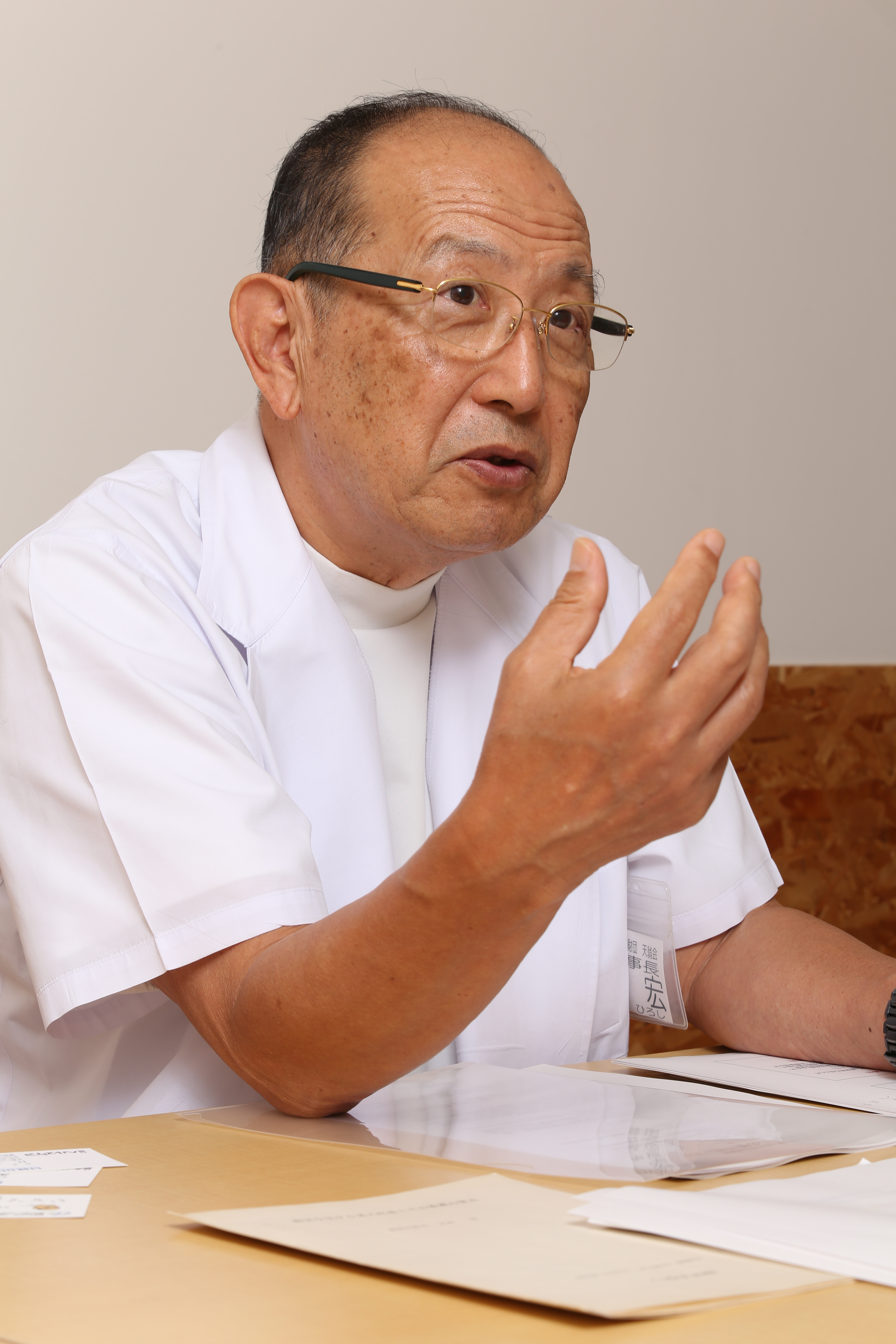 2014年10月撮影